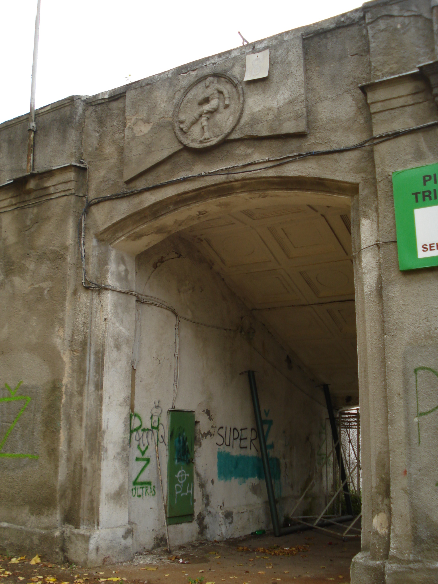 Žalgiris Stadium in Vilnius. Build in 1950